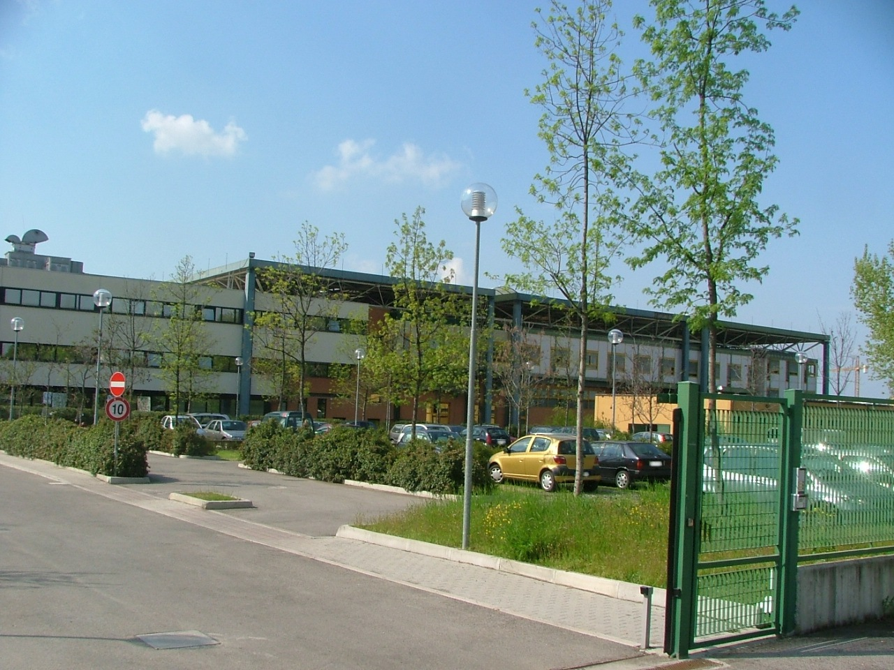 Facoltà di Medicina Veterinaria, Bologna, Italy